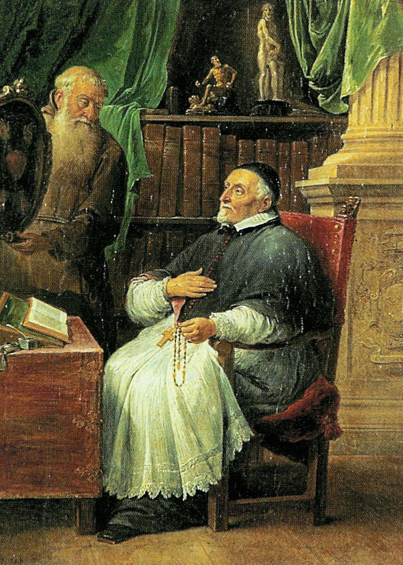 Antonius Triest (1577-1657) - bisschop van Brugge (1616-1620) en nadien van Gent (1621-1657) - België